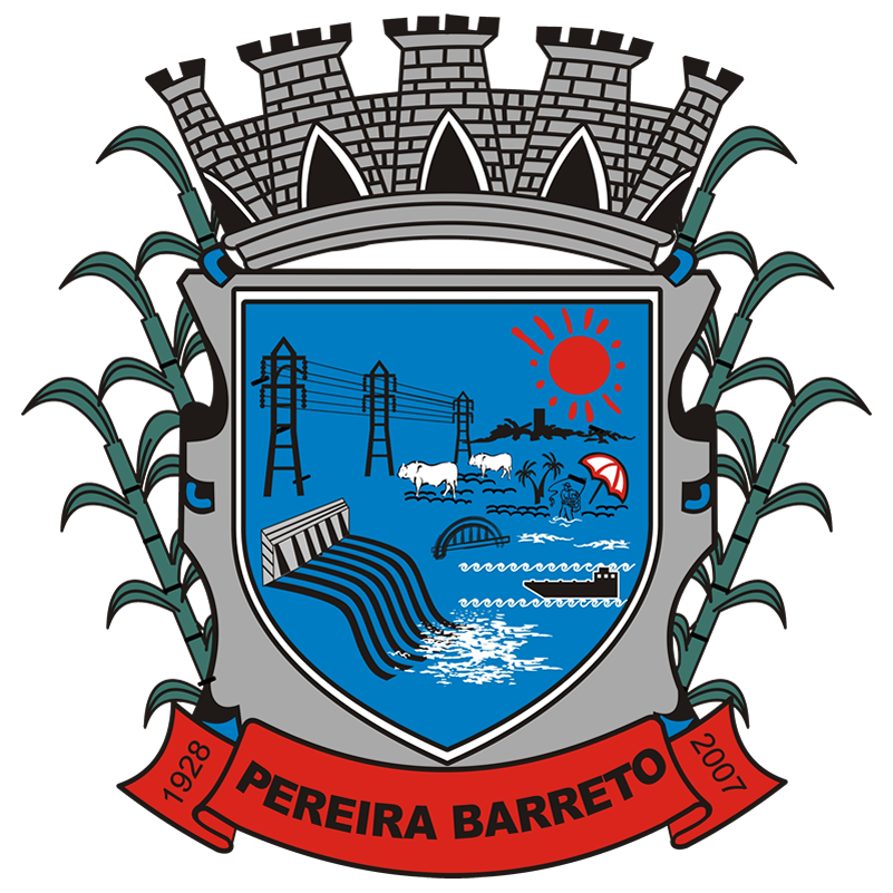 Brasão da cidade de Pereira Barreto - São Paulo - Brasil.